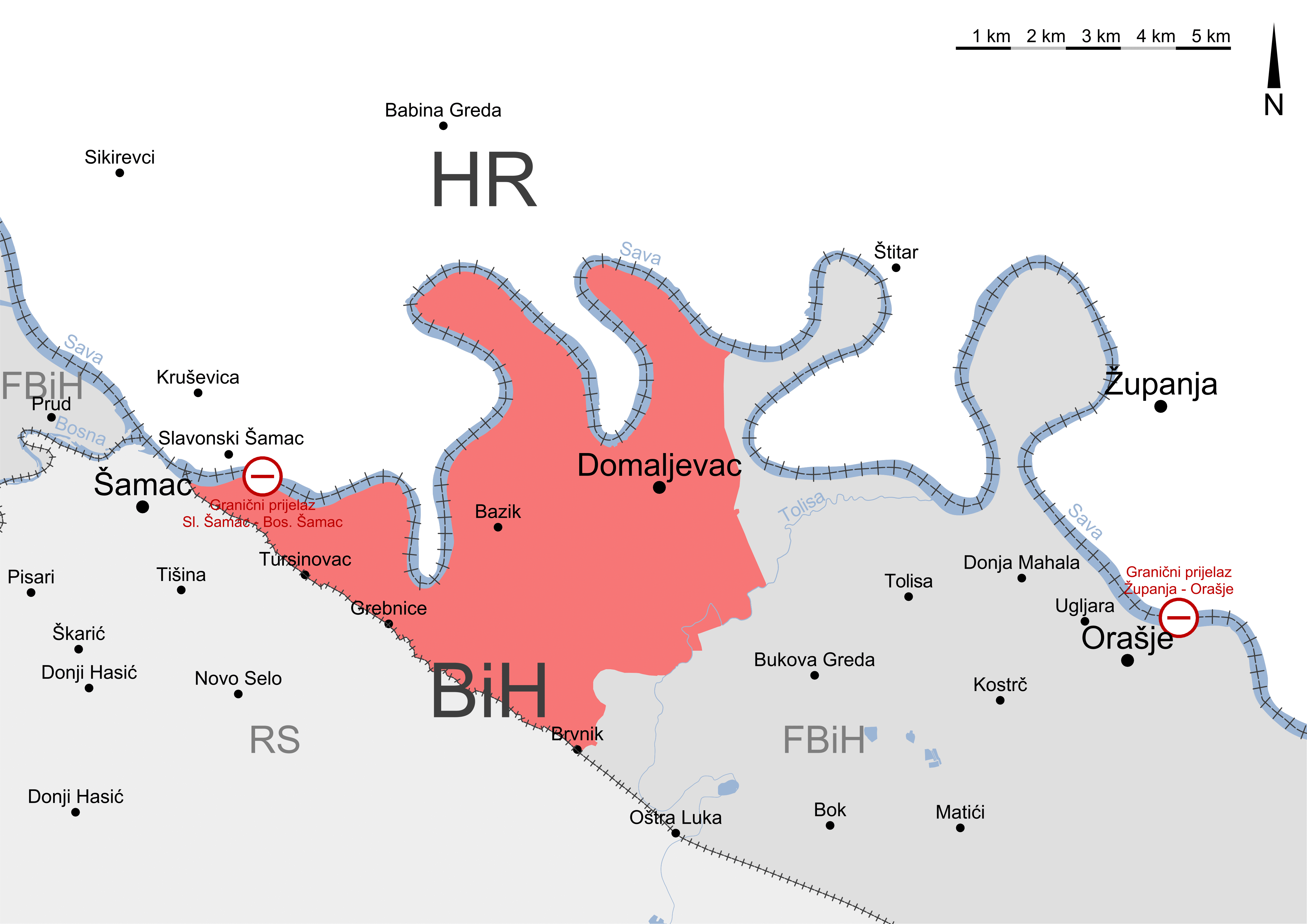 Municipal boundary of Domaljevac-Šamac and surrounding places